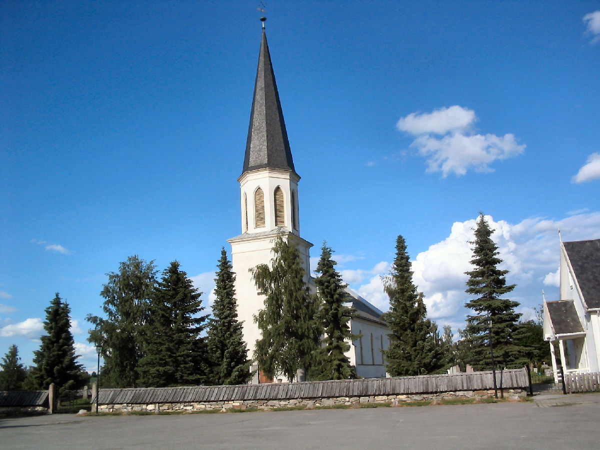 Romedal kirke, Stange municipality.